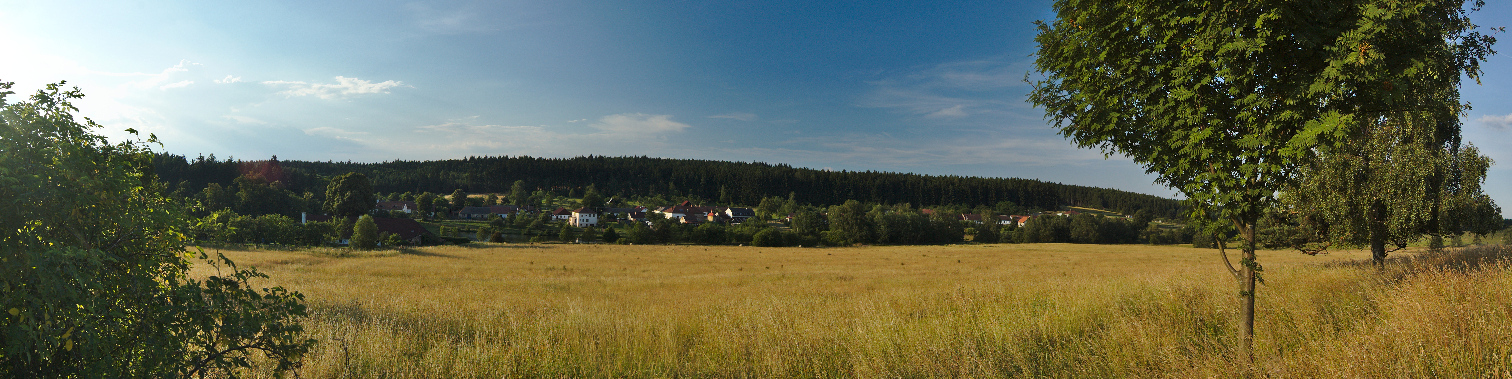 Pohora - panorama z kopce, Horní Štěpánov, okres Prostějov